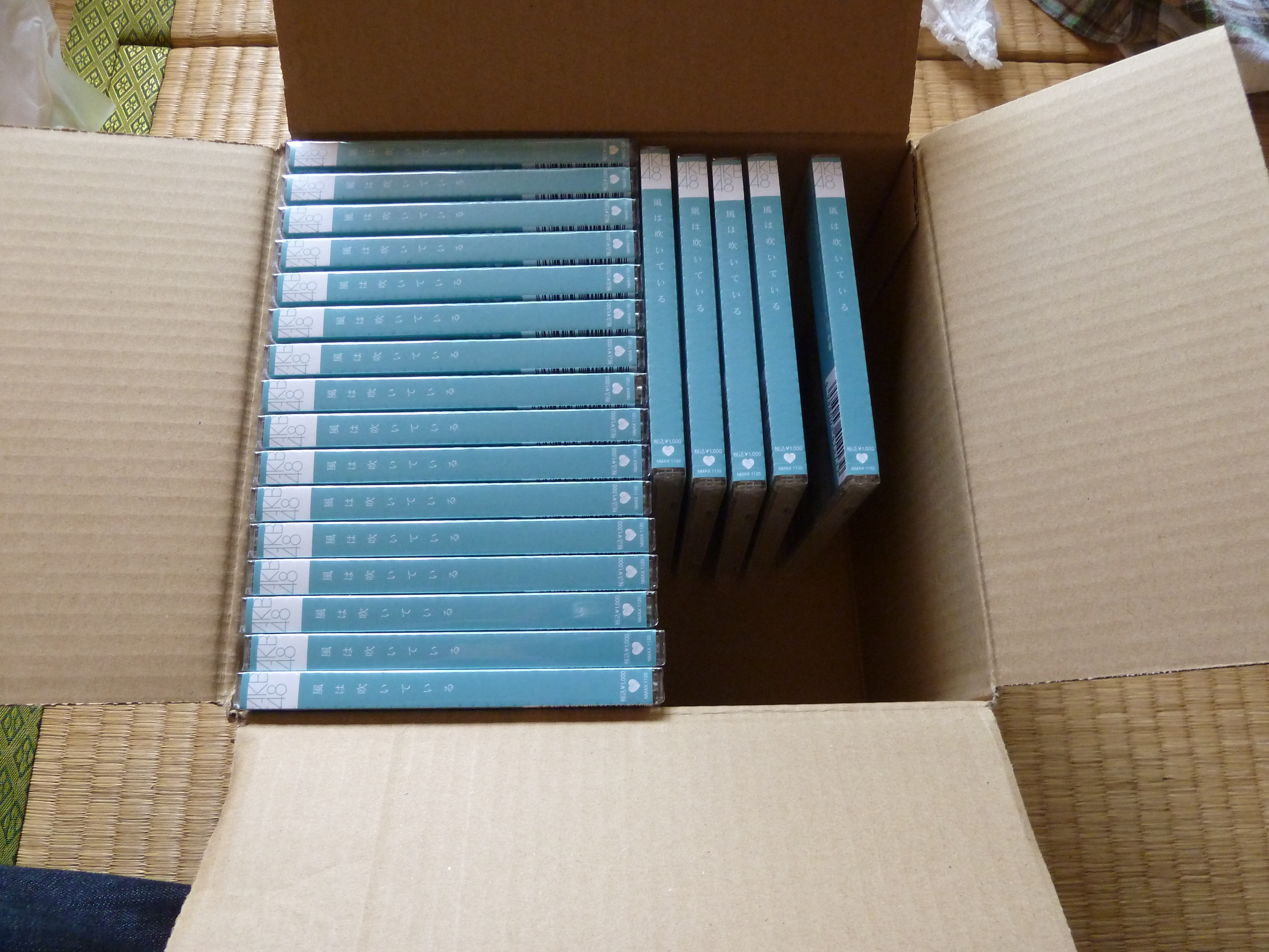 AKB48 シングルCD「風は吹いている」